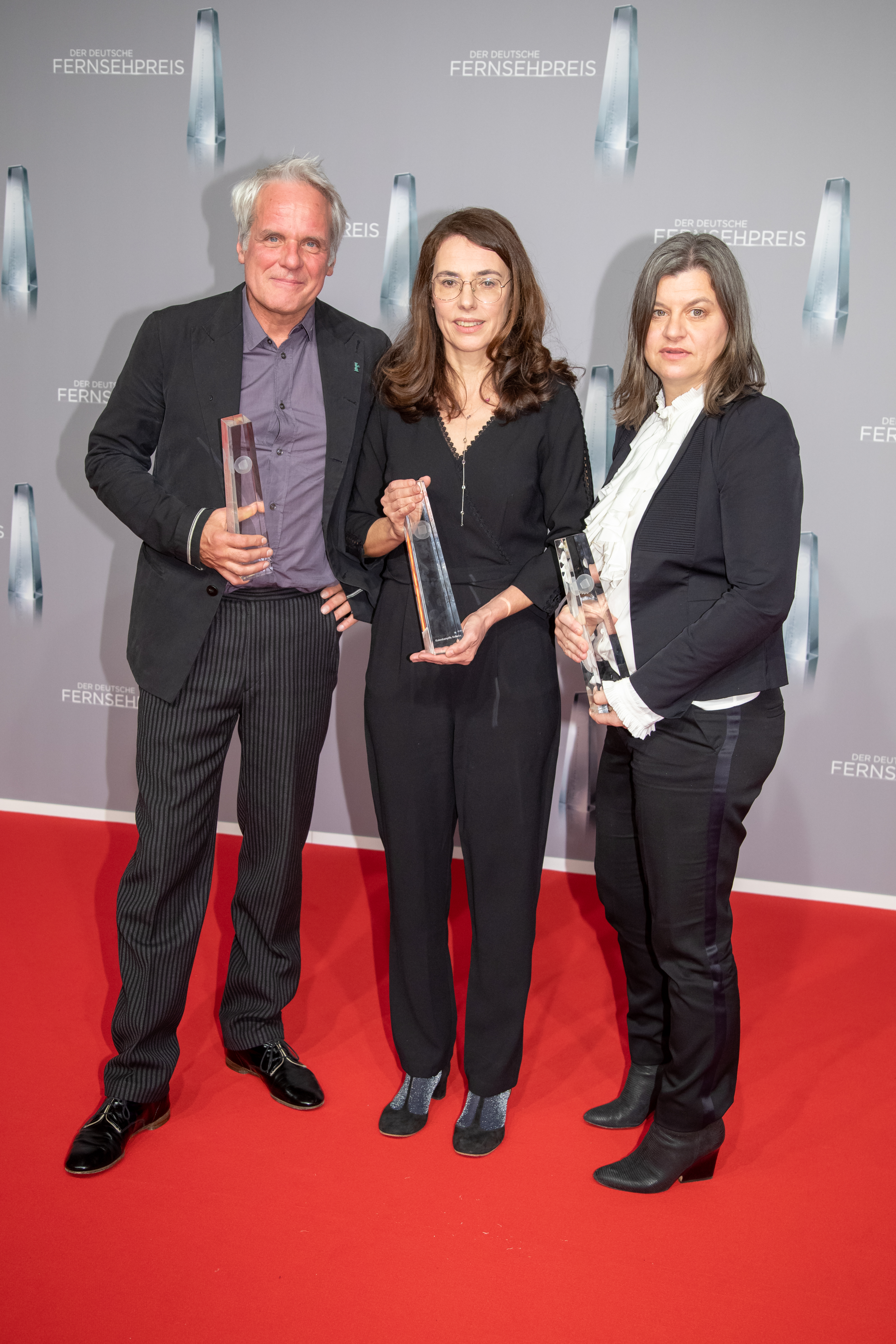 Thomas Kufus; Regina Schilling; Simone Reuter beim Deutschen Fernsehpreis 2019 in der Düsseldorfer Rheinterrasse